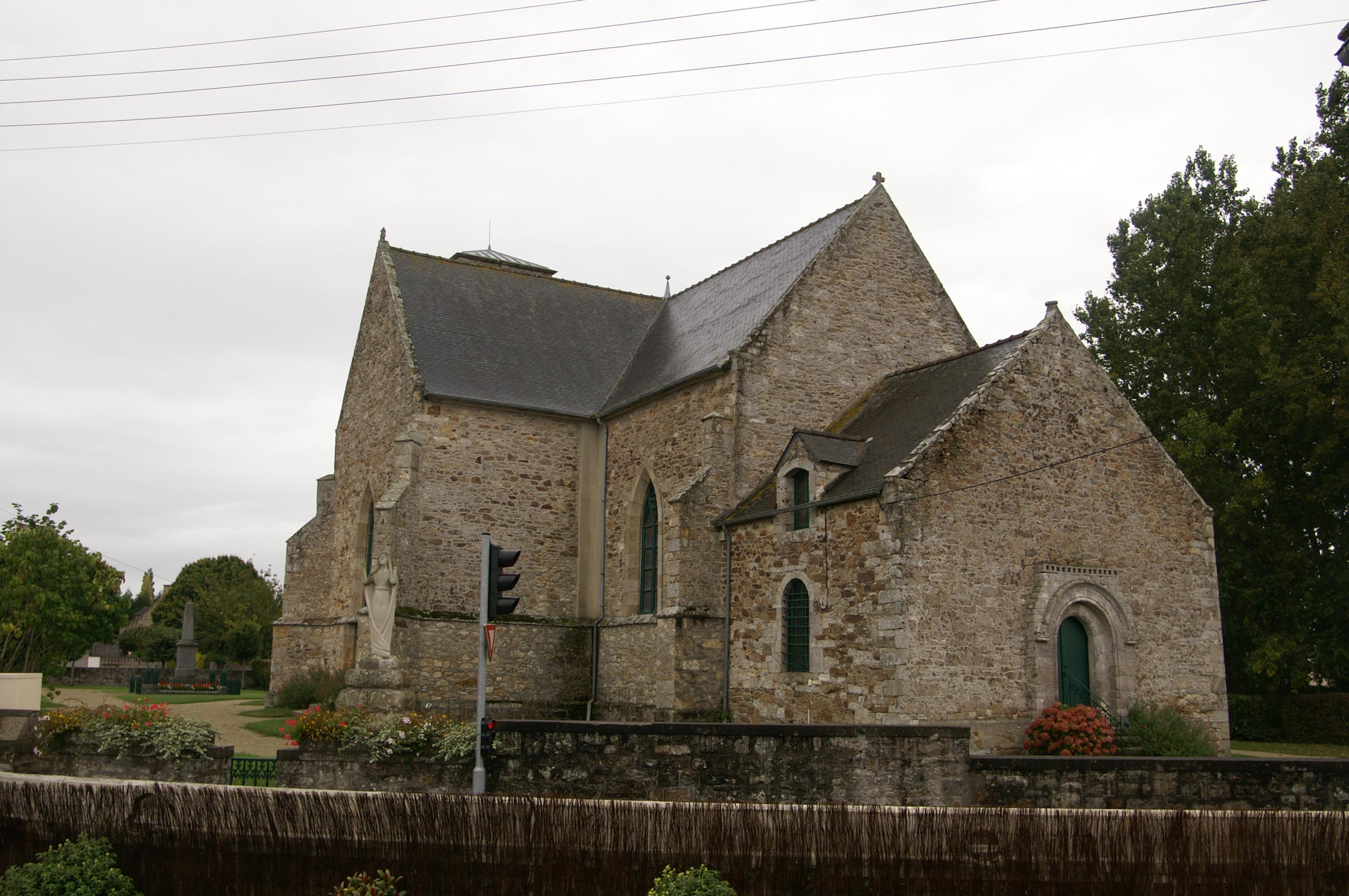 Église Saint-Pétrock de Trégon.